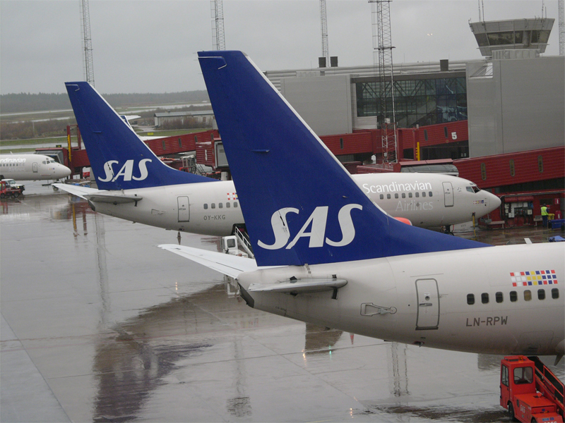 Ett par SAS-plan står vid T5 på Arlanda